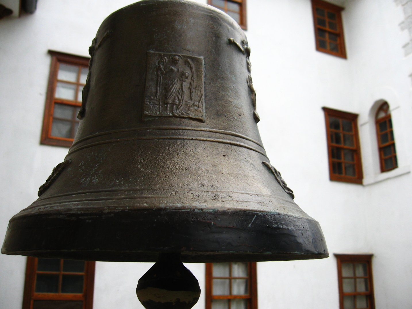 Romanian Skete Prodromos - detail.